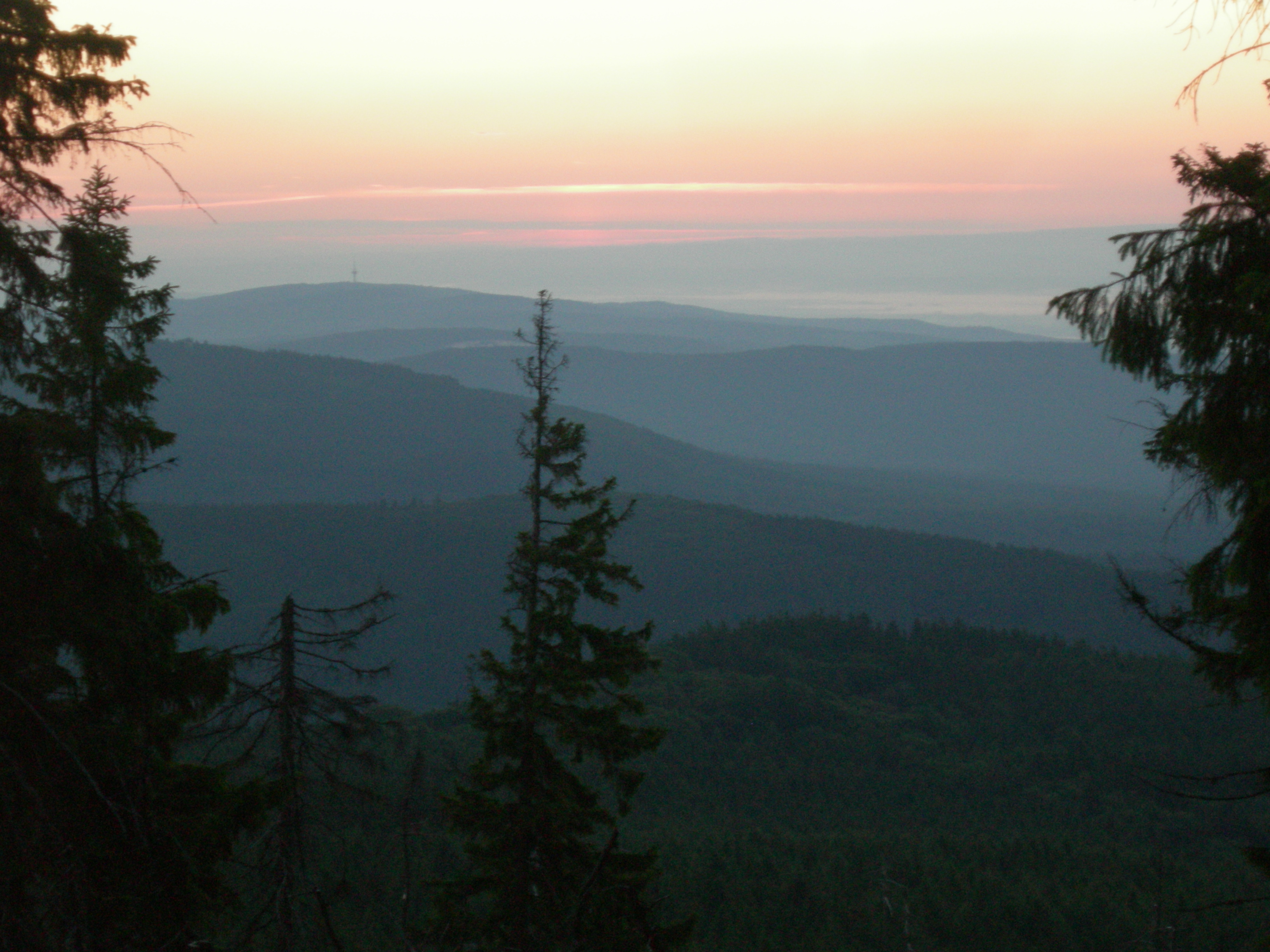 Blick auf den Winterstein, vom Altkönig aus gesehen